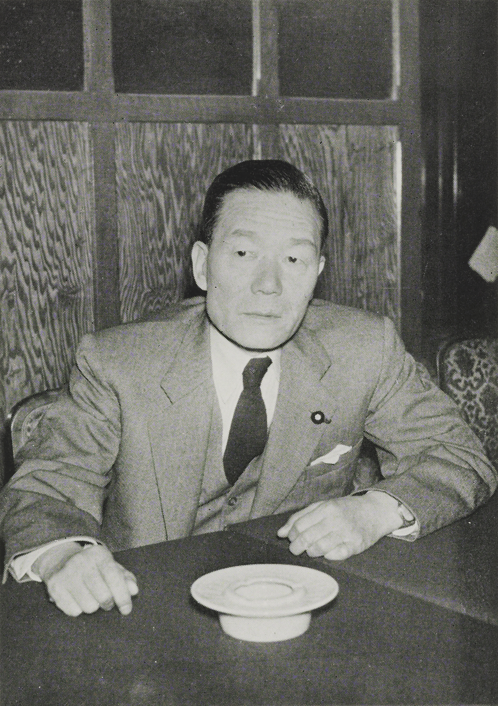 Portrait of Shiina Etsusaburo (椎名悦三郎, 1898 – 1979)